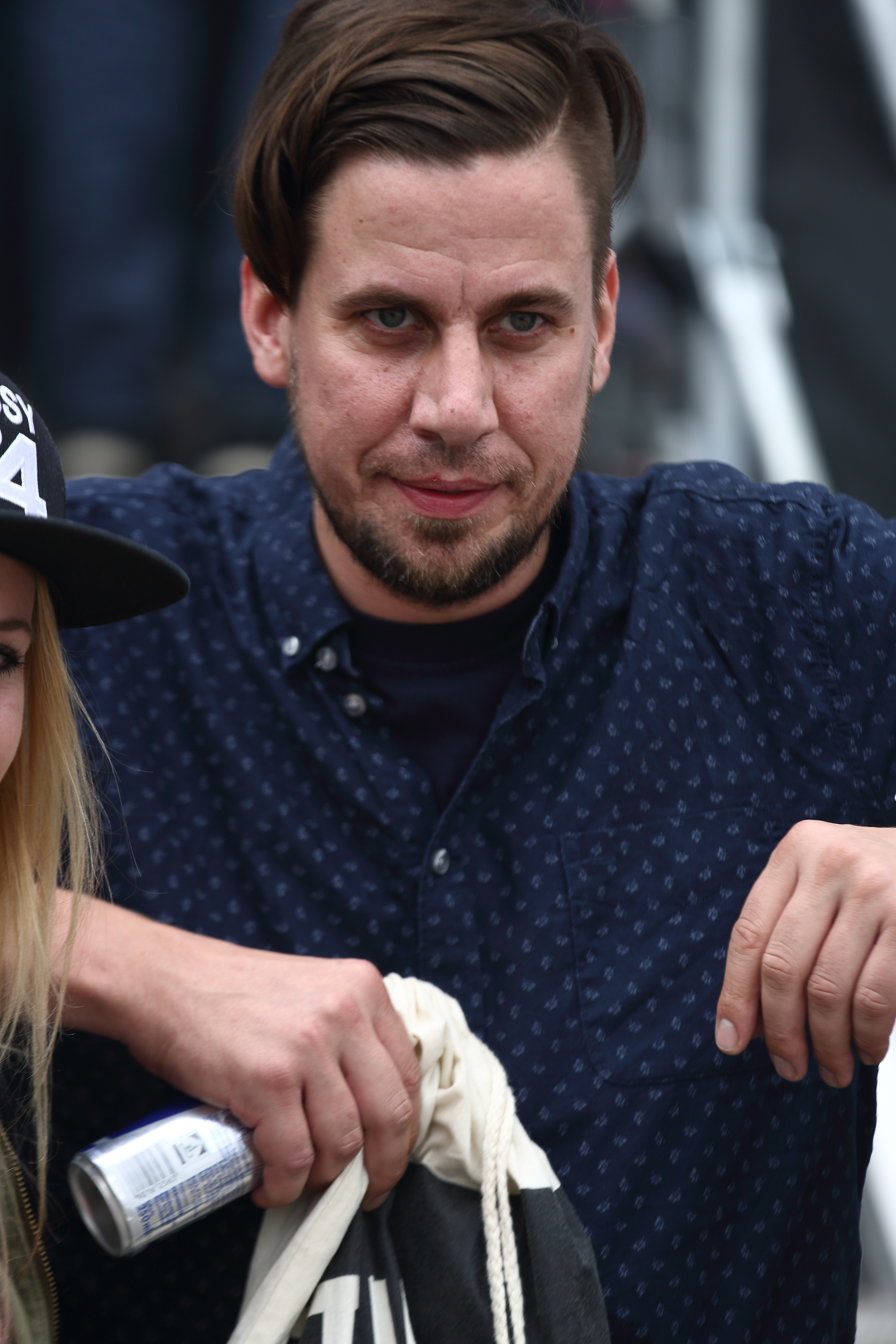 Oliver Koletzki auf dem Echelon 2014 Festivalsommer This photo was created with the support of donations to Wikimedia Österreich and Wikimedia Deutschland in the context of the CPB project "Festival Summer". For taking this photo and licensing it under a free licence a (press) accreditation was required. The photographer had a valid accreditation and has sent it to the email response team, it has been archived in the OTRS system. Users with OTRS account can access it here. Please be aware that (press) accreditations are a permission to generally take photos only and do not make any statement about the copyright status of this photo! Link to the ticket: Personality rights warningAlthough this work is freely licensed or in the public domain, the person(s) shown may have rights that legally restrict certain re-uses unless those depicted consent to such uses. In these cases, a model release or other evidence of consent could protect you from infringement claims.